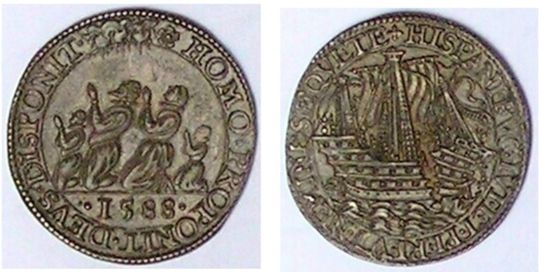 Rekenpenning Dordrecht 1588, op de vernietiging van de Spaanse Armada. Foto van eigen exemplaar.